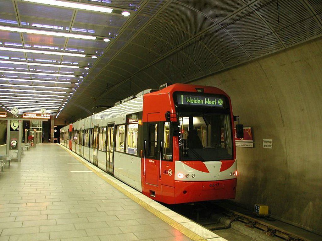 KVB TW 4517 in Bensberg